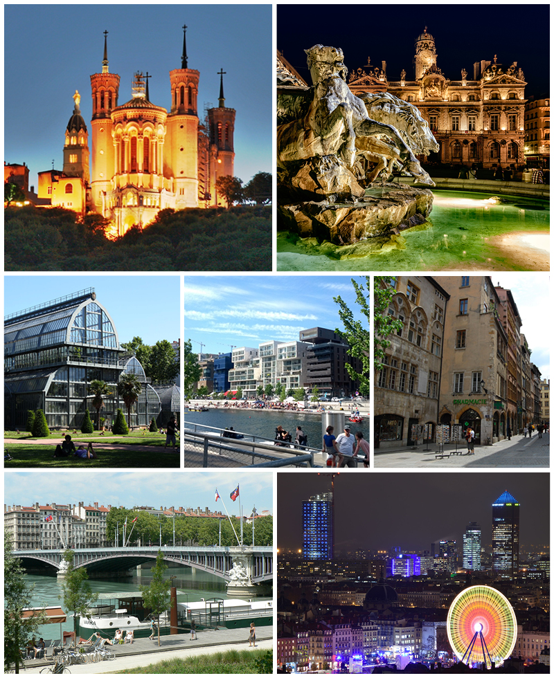 Différentes vues de la ville de Lyon : Notre-Dame de Fourvière, Place des Terreaux (Fontaine Bartholdi et Hotel de Ville), serres du Parc de la Tête d'Or, la place Nautique dans la quartier de Confluence sur la Saone, Rue St Jean (Vieux Lyon), Berges du Rhone et pont Lafayette, panorama urbain sur le quartier d'affaire de la Part-dieu le jour de la fête des lumières (place Bellecour au premier plan). File:Basilica Fourviere Lyon HDR.jpg - Elwood j blues File:Fontaine Bartholdi Place des Terreaux.jpg - Qmin File:Grandes Serres (Parc de la Tête d'Or)-mai2011.jpg - TwoWings File:BassinNautique Confluence Lyon.jpg - Tibidibtibo File:Streets of Lyon (2531378286).jpg - edwin.11 File:Pont-R08-Lafayet-10.JPG - Basilio File:La Part-Dieu By Night.JPG - Samolymp